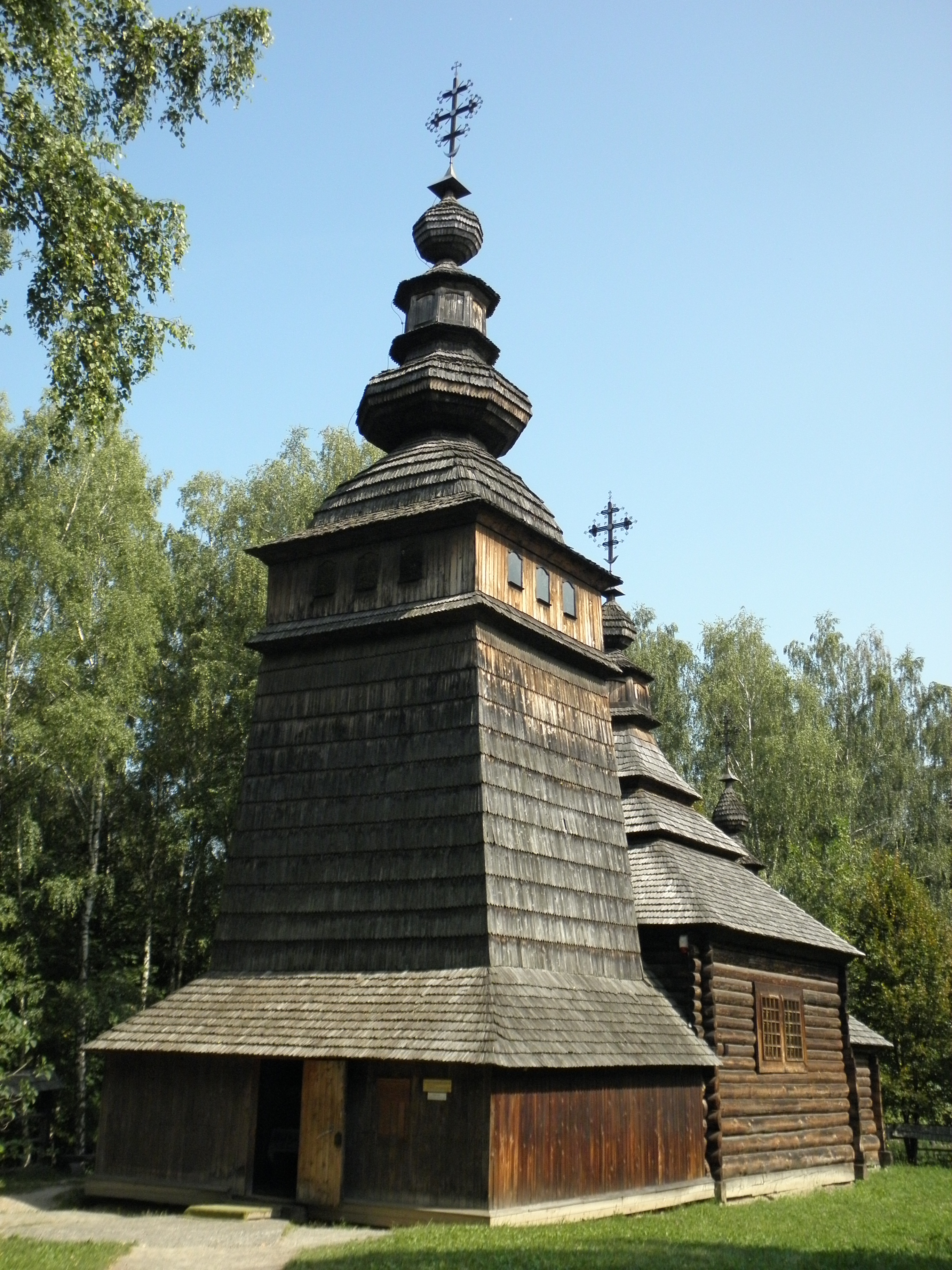 Комплекс Львівського музею народної архітектури та побуту, Львів, Чернеча Гора вул., 1